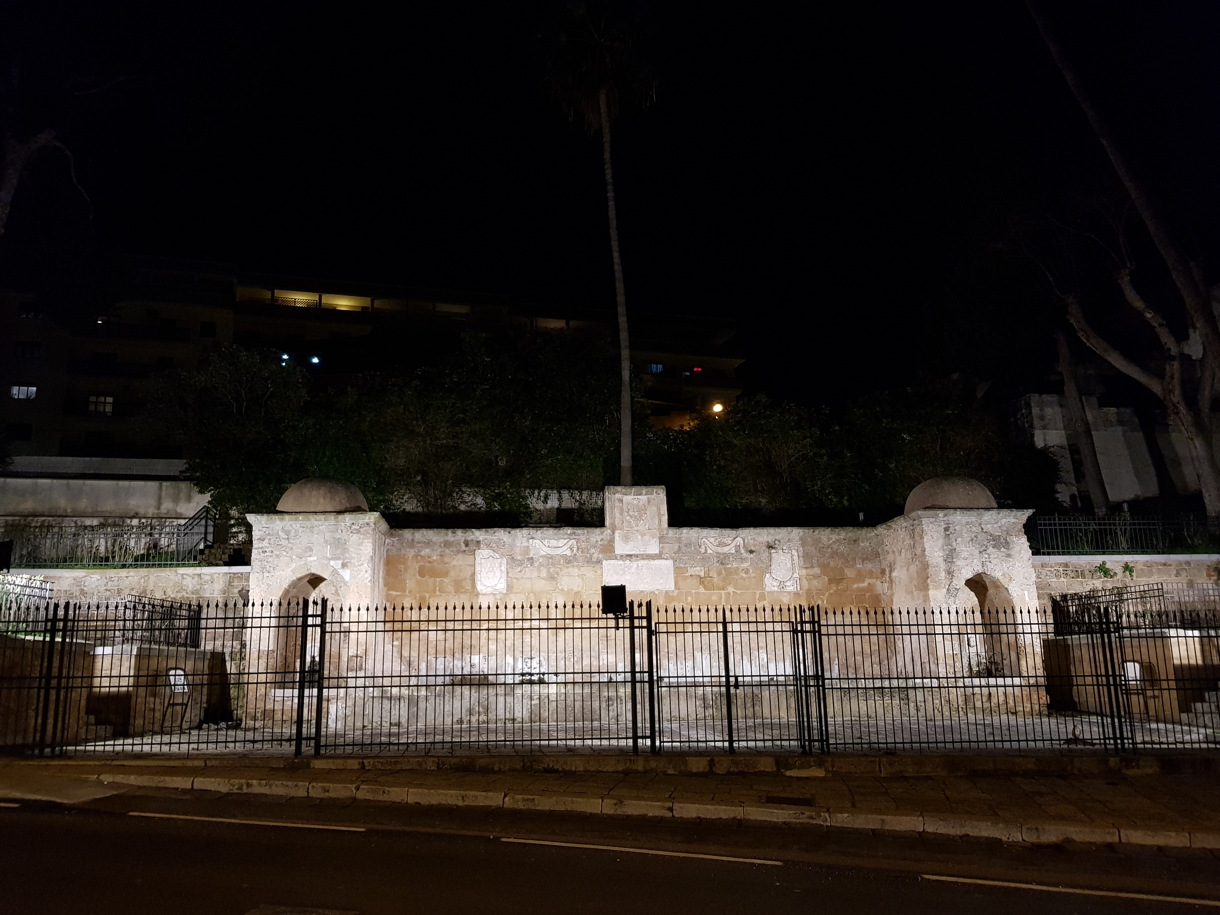 fontana Tancredi This is a photo of a monument which is part of cultural heritage of Italy.